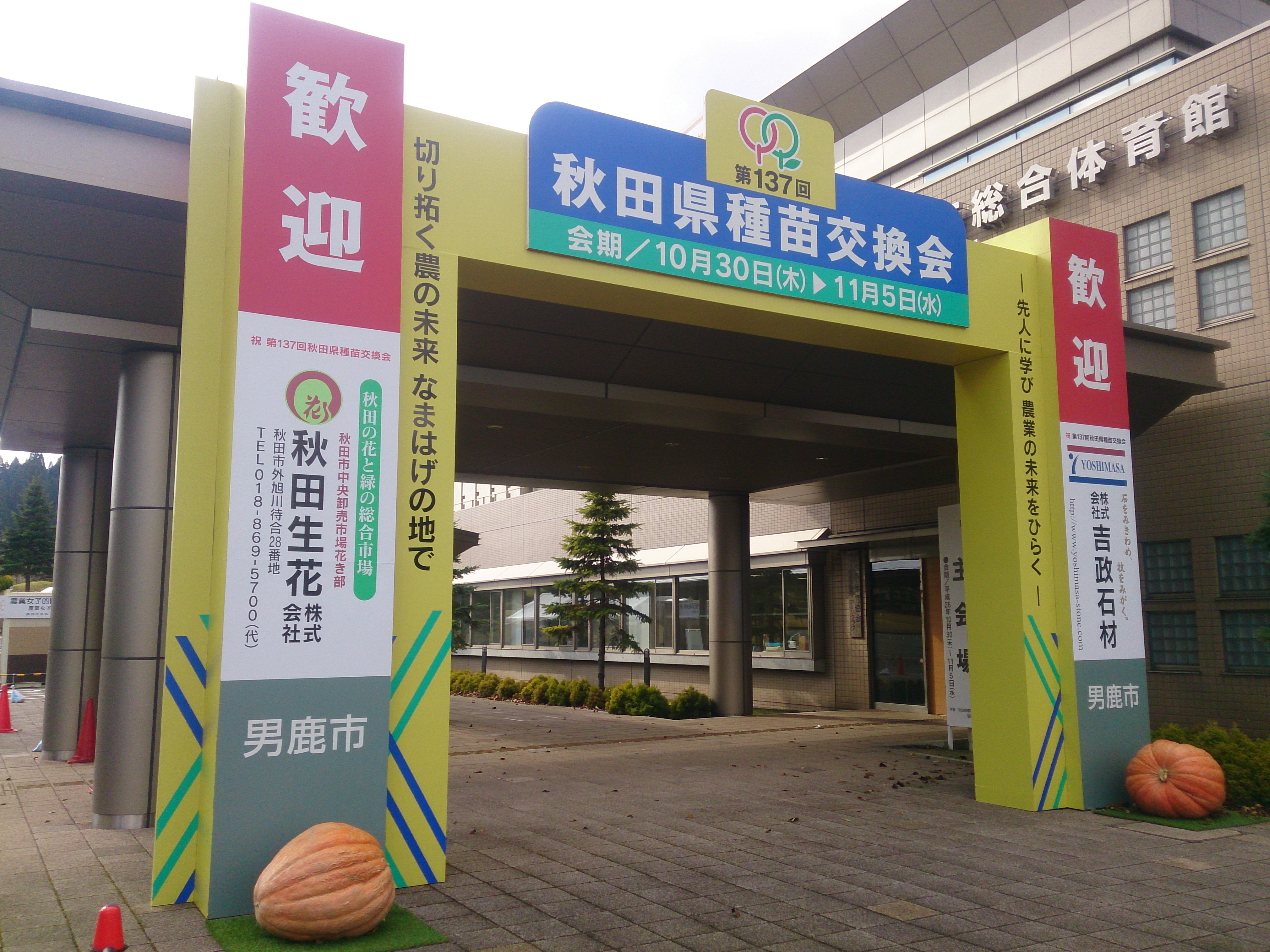 2014年に男鹿市で開催された種苗交換会の主会場である、男鹿市総合体育館に設けられた入場ゲート。